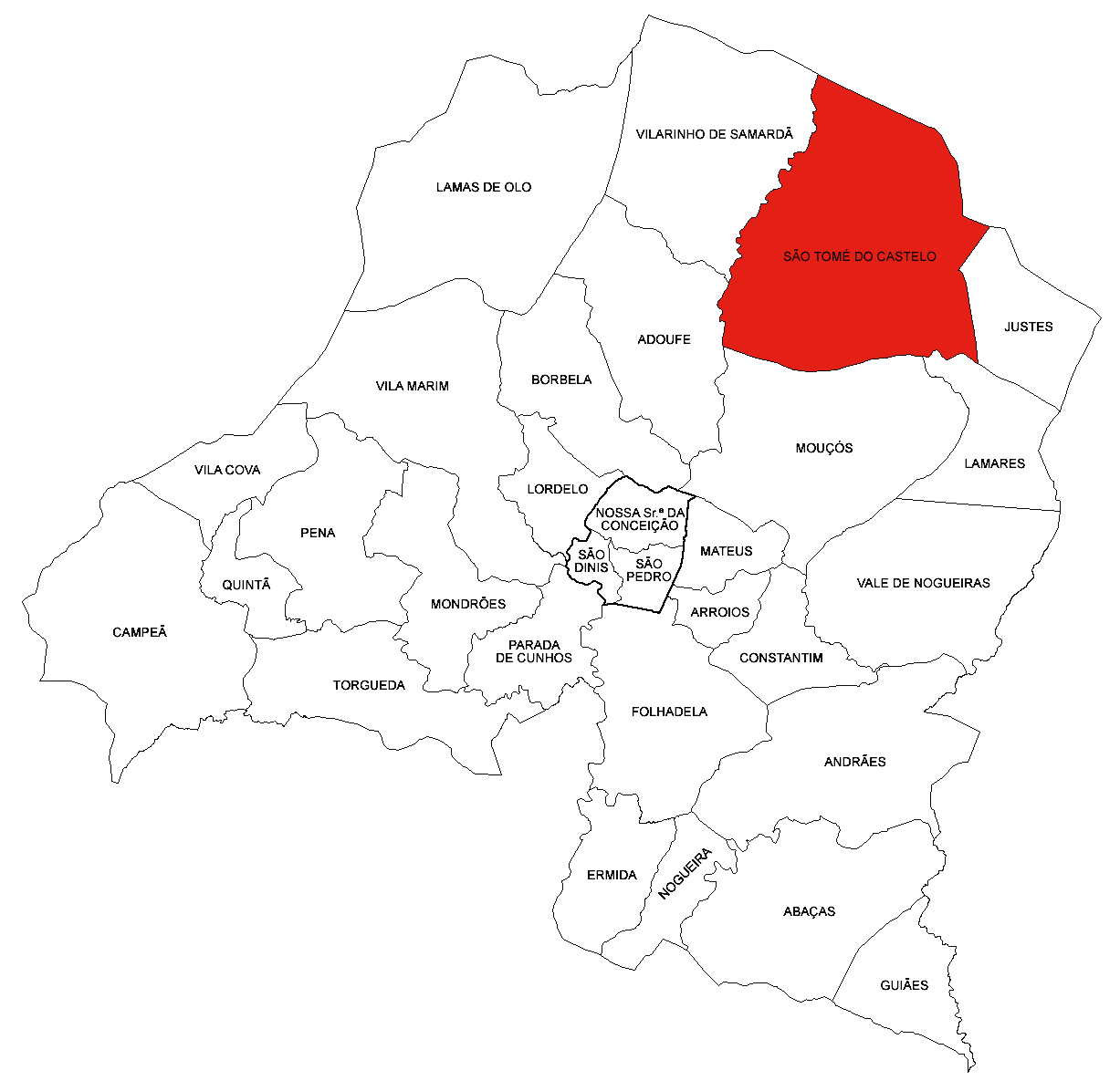 Freguesia de São Tomé do Castelo (concelho de Vila Real)